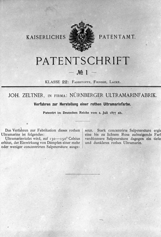 Interessante Aufnahmen aus dem Reichs-Patent-Amt in Berlin! Die erste Patentschrift des Deutschen Reiches. Erteilt wurde dieselbe am 2. Juli 1877 und betraf ein Verfahren zur Herstellung roter Ultramarin-Farbe.